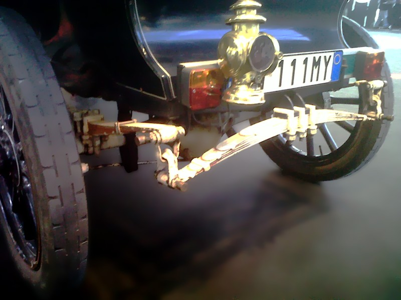 Sospensione posteriore della Cadillac thirty del 1910